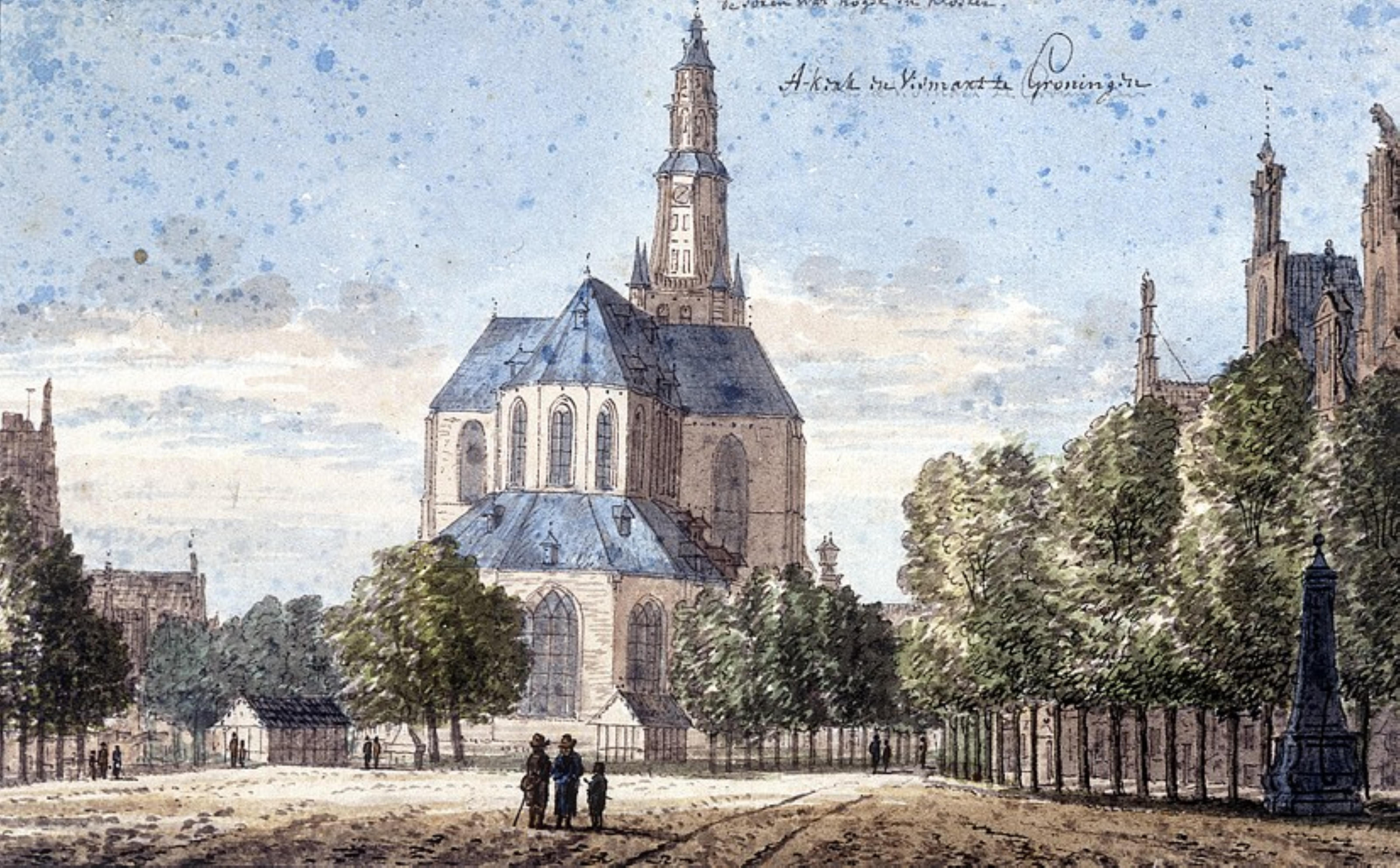 Vismarkt met Akerk. Op de tekening staat de aantekening 'De toren wat hoger en wat kloeker'. Dit kan erop duiden dat deze tekening als een voorstudie voor een andere tekening heeft gediend. Toegeschreven aan Jan Bulthuis.